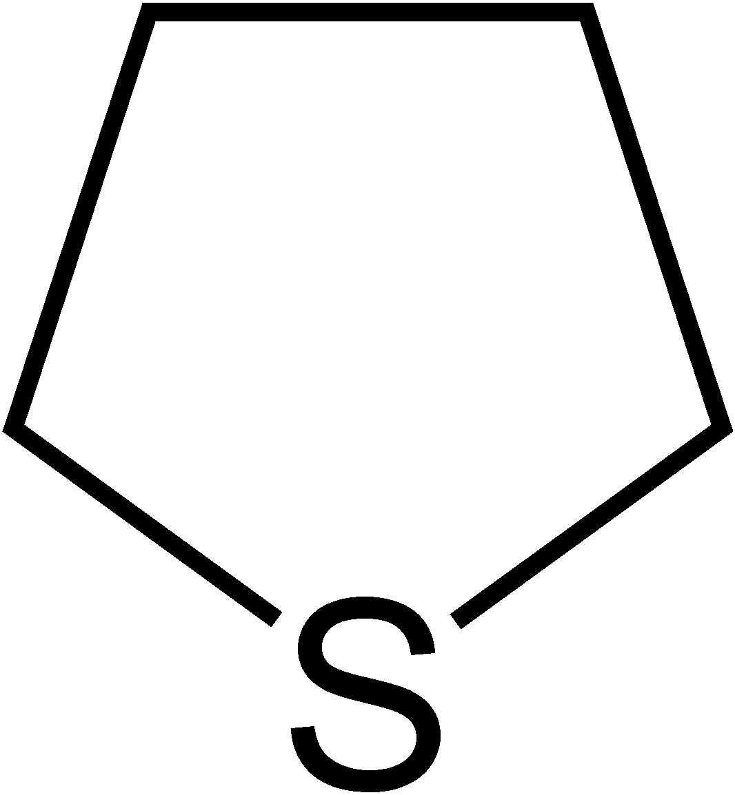 Struktur von Tetrahydrothiophen